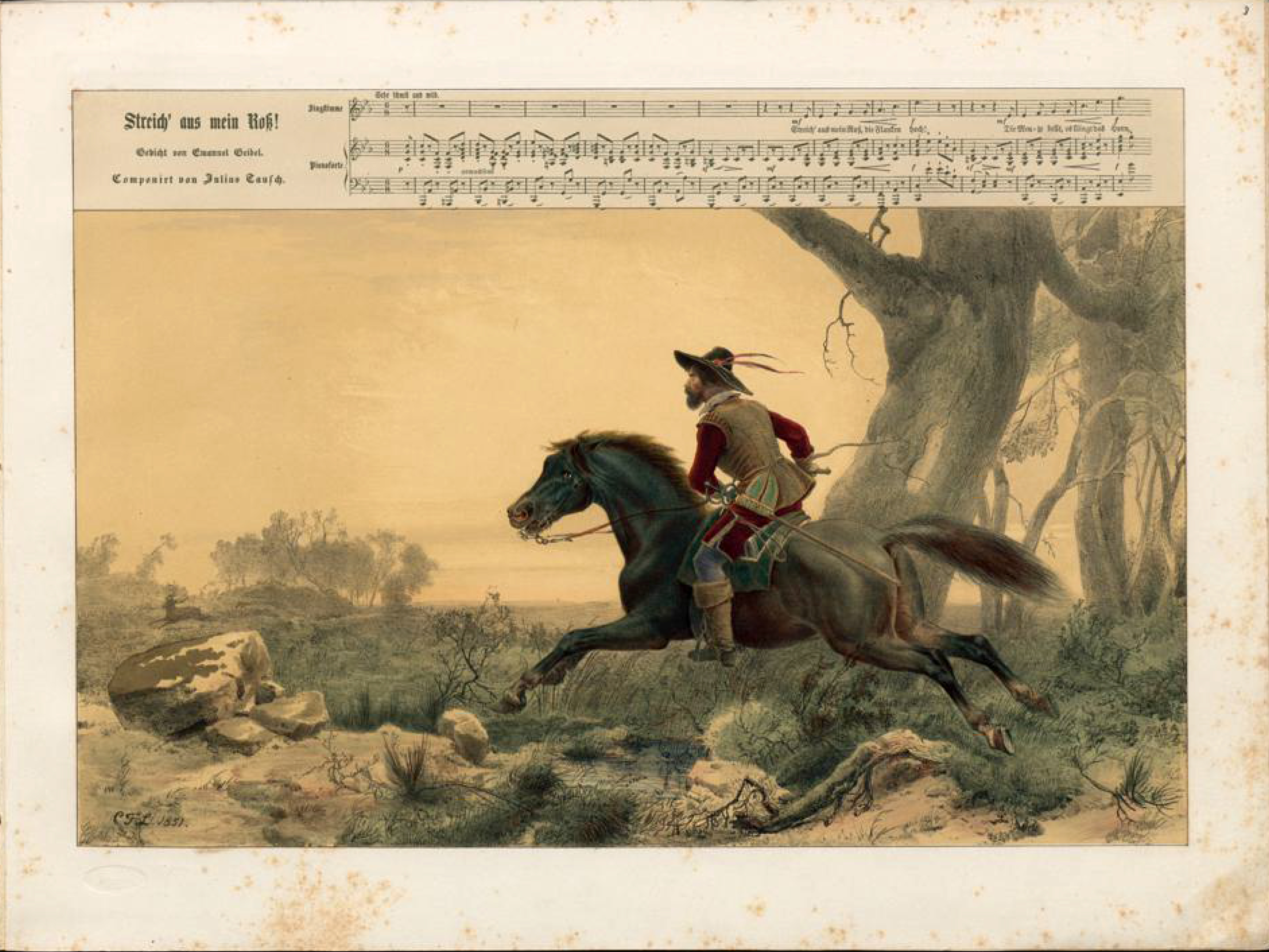 Düsseldorfer Lieder-Album, Arnz & Co. 1851, S. 17 – "Streich' aus mein Roß!" Gedicht von Emanuel Geibel, Komponist Julius Tausch, Farblithografie nach Illustration von Carl Friedrich Lessing